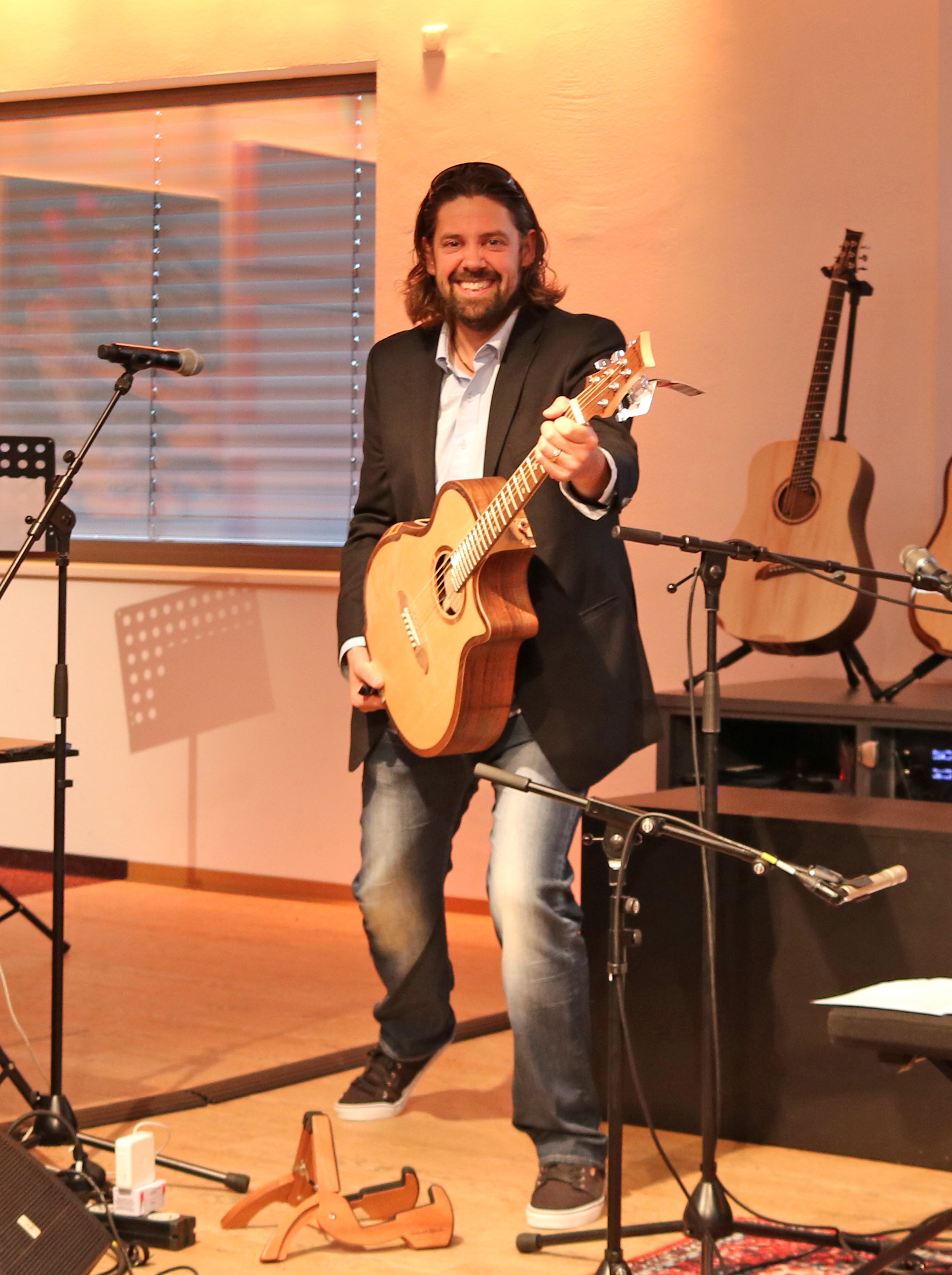 Mike Miltimore, Gründer und Eigentümer der Firma Riversong Guitars, präsentiert seine Gitarren